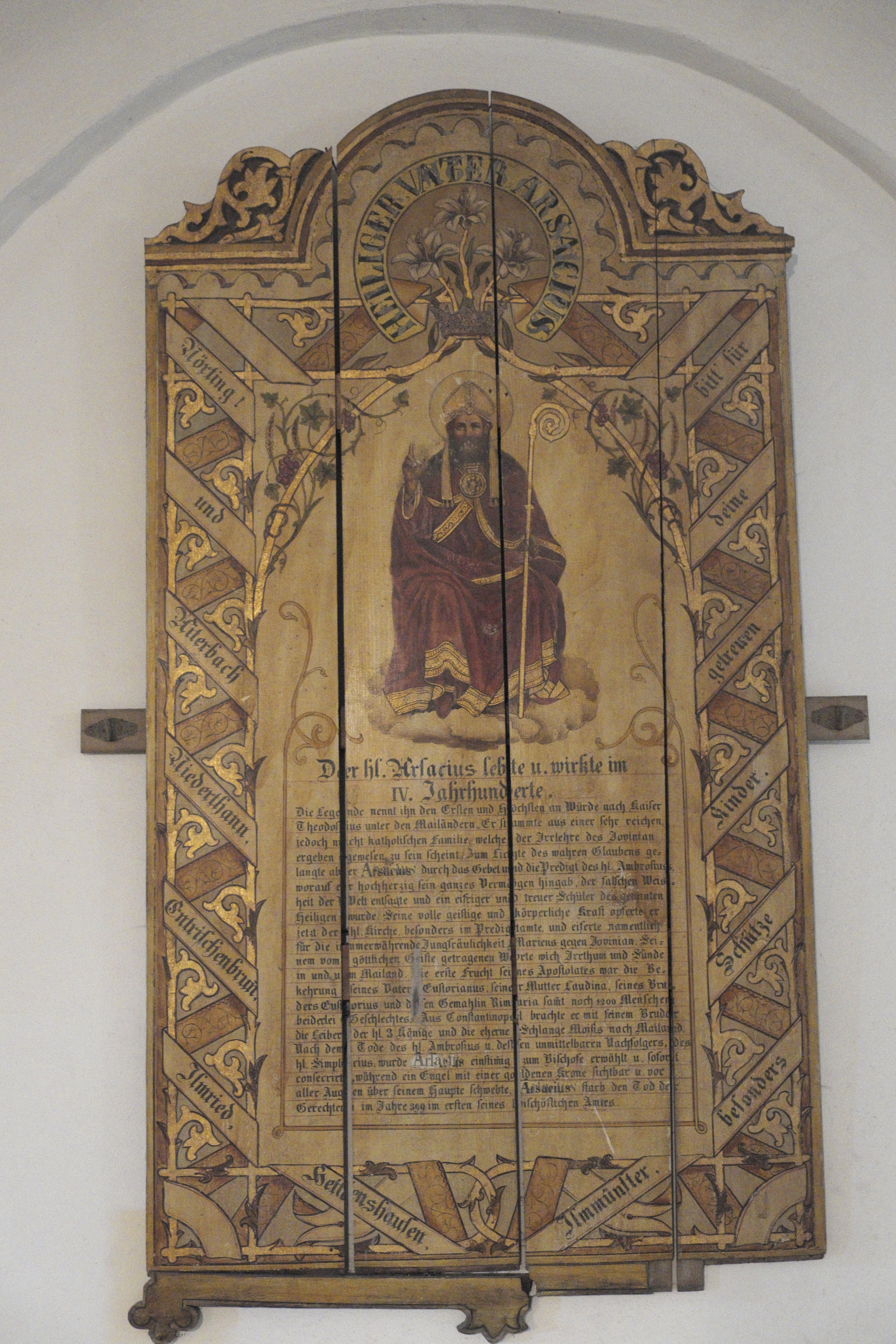 Katholische Pfarr-, ehemalige Kollegiatsstiftskirche St. Arsatius in Ilmmünster im Landkreis Pfaffenhofen an der Ilm (Bayern/Deutschland), Tafel mit der Legende des hl. Arsatius in der Krypta